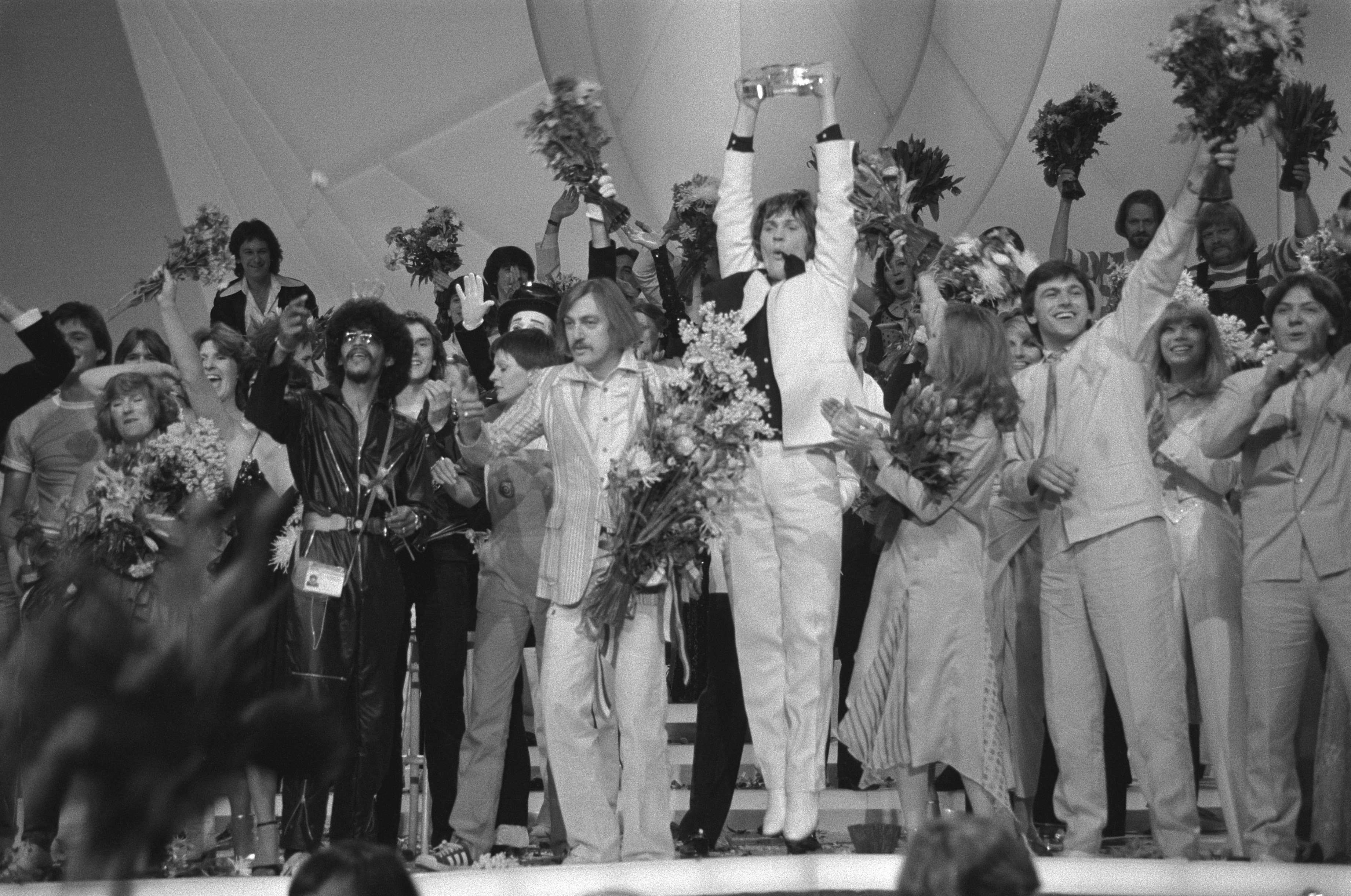 Collectie / Archief : Fotocollectie Anefo Reportage / Serie : [ onbekend ] Beschrijving : Eurovisie Songfestival 1980 ( Den Haag ); winnaar Johnny Logan in de bloemen Datum : 19 april 1980 Locatie : Den Haag, Zuid-Holland Trefwoorden : BLOEMEN, Winnaars, songfestivals Persoonsnaam : Johnny Logan Fotograaf : Dijk, Hans van / Anefo Auteursrechthebbende : Nationaal Archief Materiaalsoort : Negatief (zwart/wit) Nummer archiefinventaris : bekijk toegang 2.24.01.05 Bestanddeelnummer : 930-7805